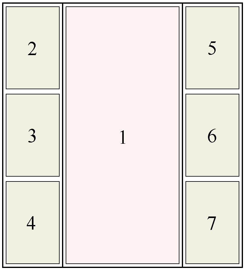 Poliptyk augustianski (rekonstrukcja) - oltarz otwarty